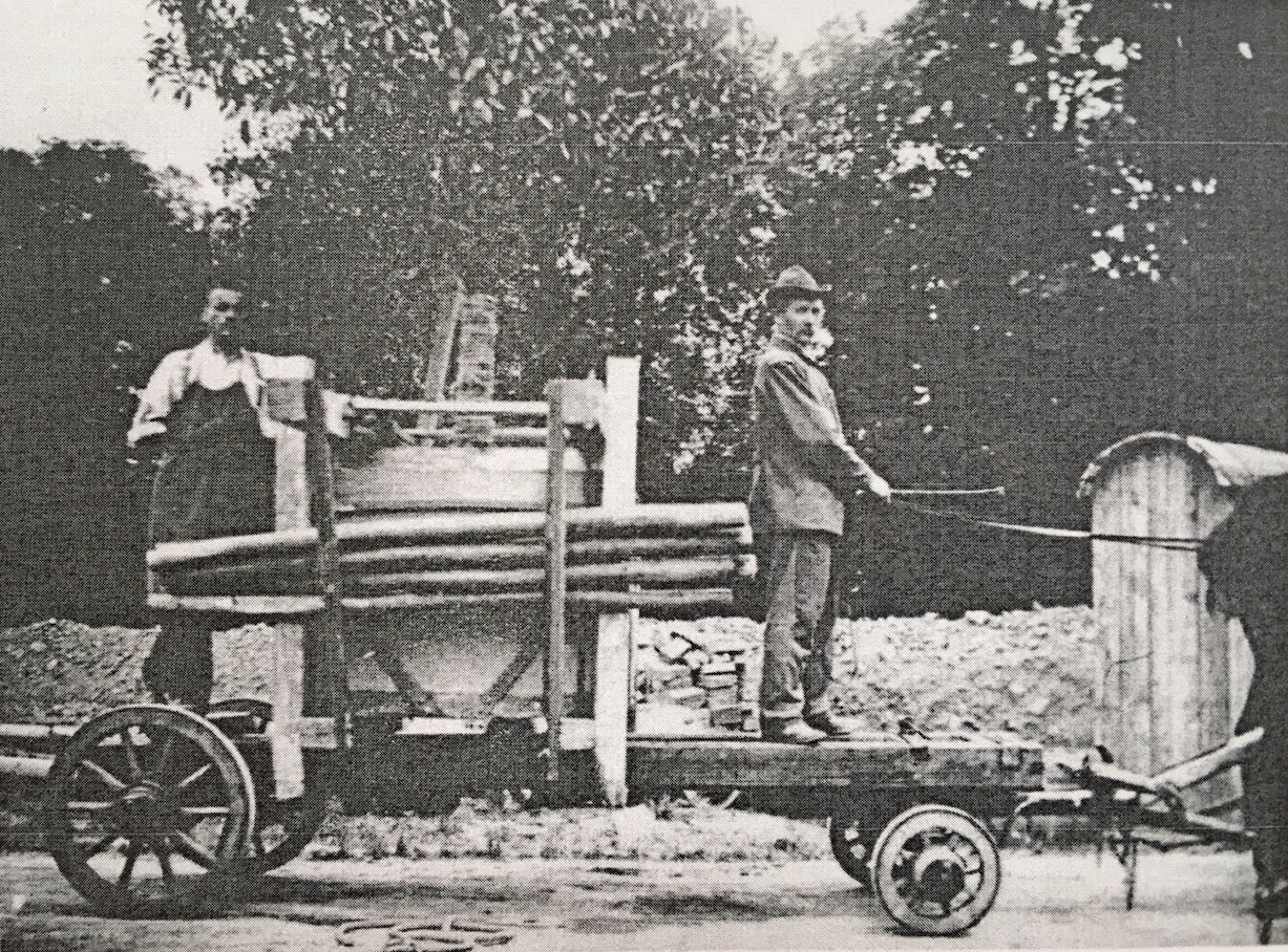 aus dem Nachlass von Schloßgarteninspektor Alfred Ehmann